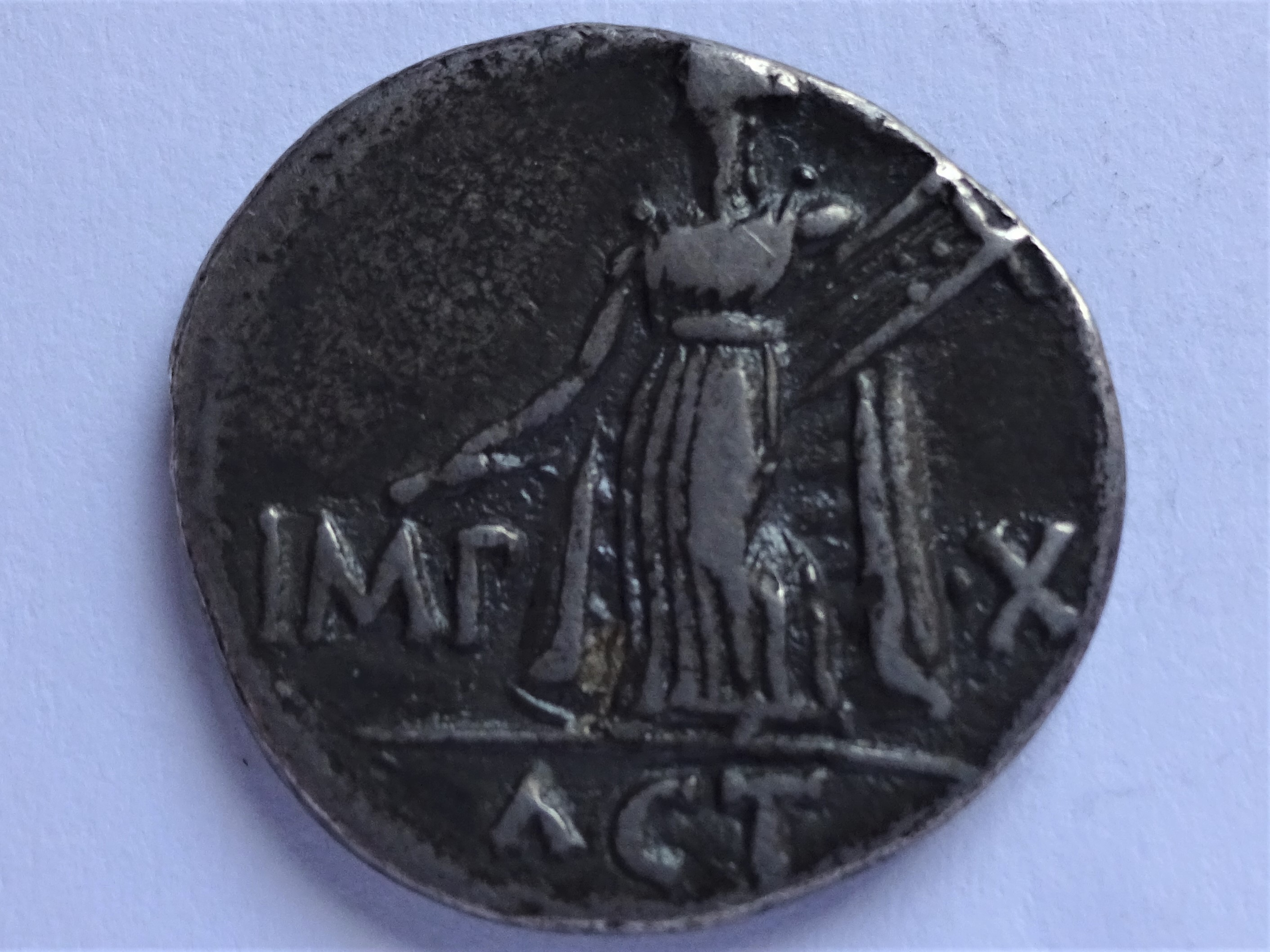 Denar des Augustus auf die Schlacht von Actium, Apollo von Actium mit Kithara, ACT im Abschnitt